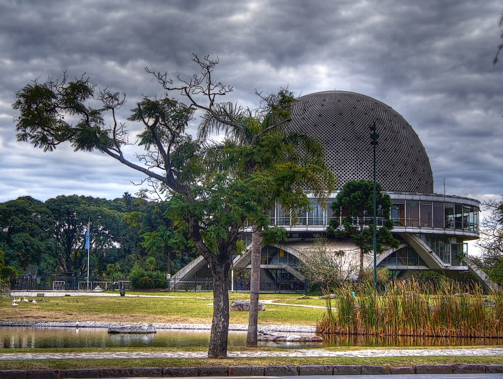 Planetario Galileo Galilei, barrio de Palermo, Buenos Aires, Argentina.